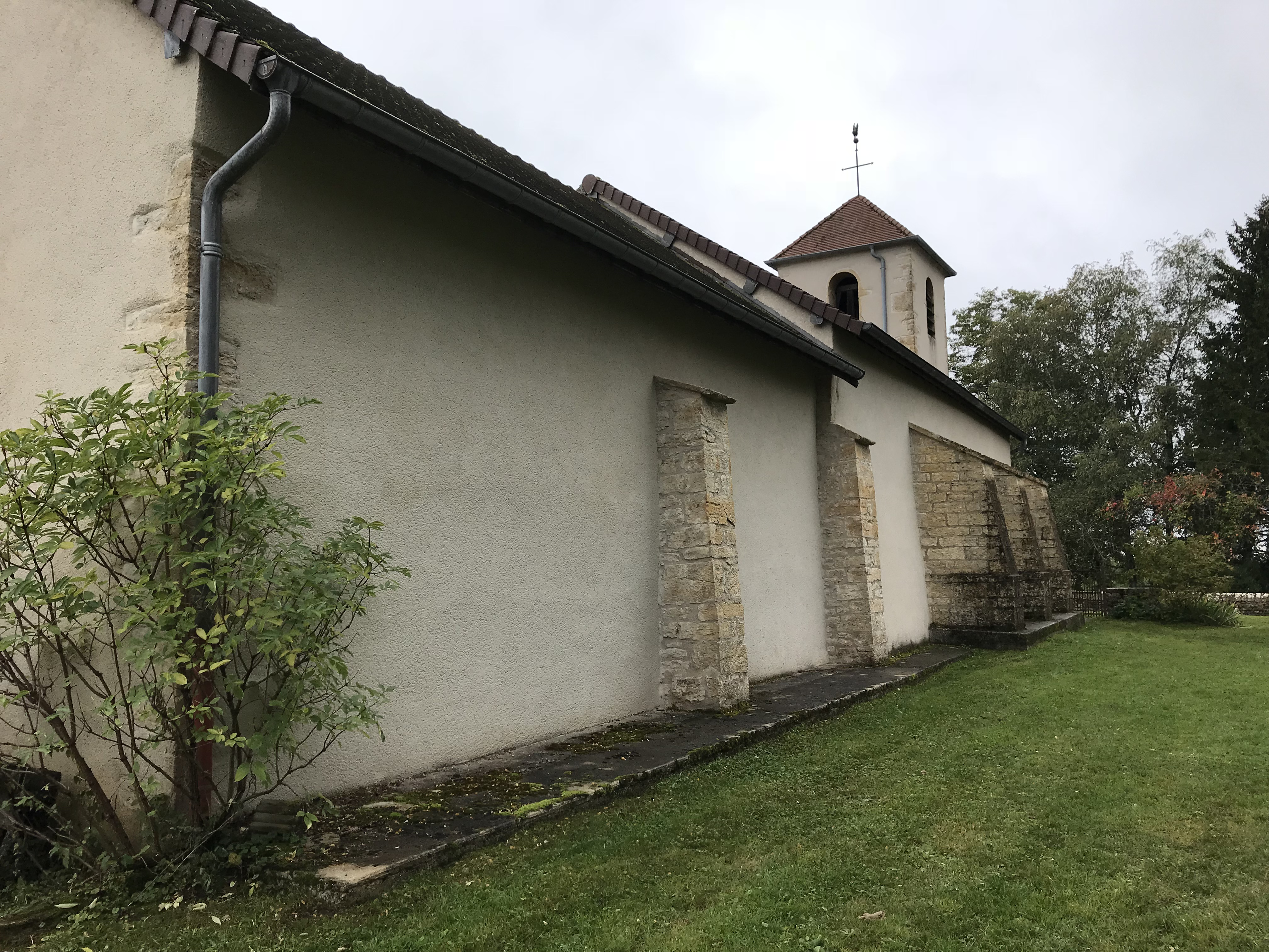 Église Saint-Hippolyte de Monnetay (Jura, France) octobre 2017.